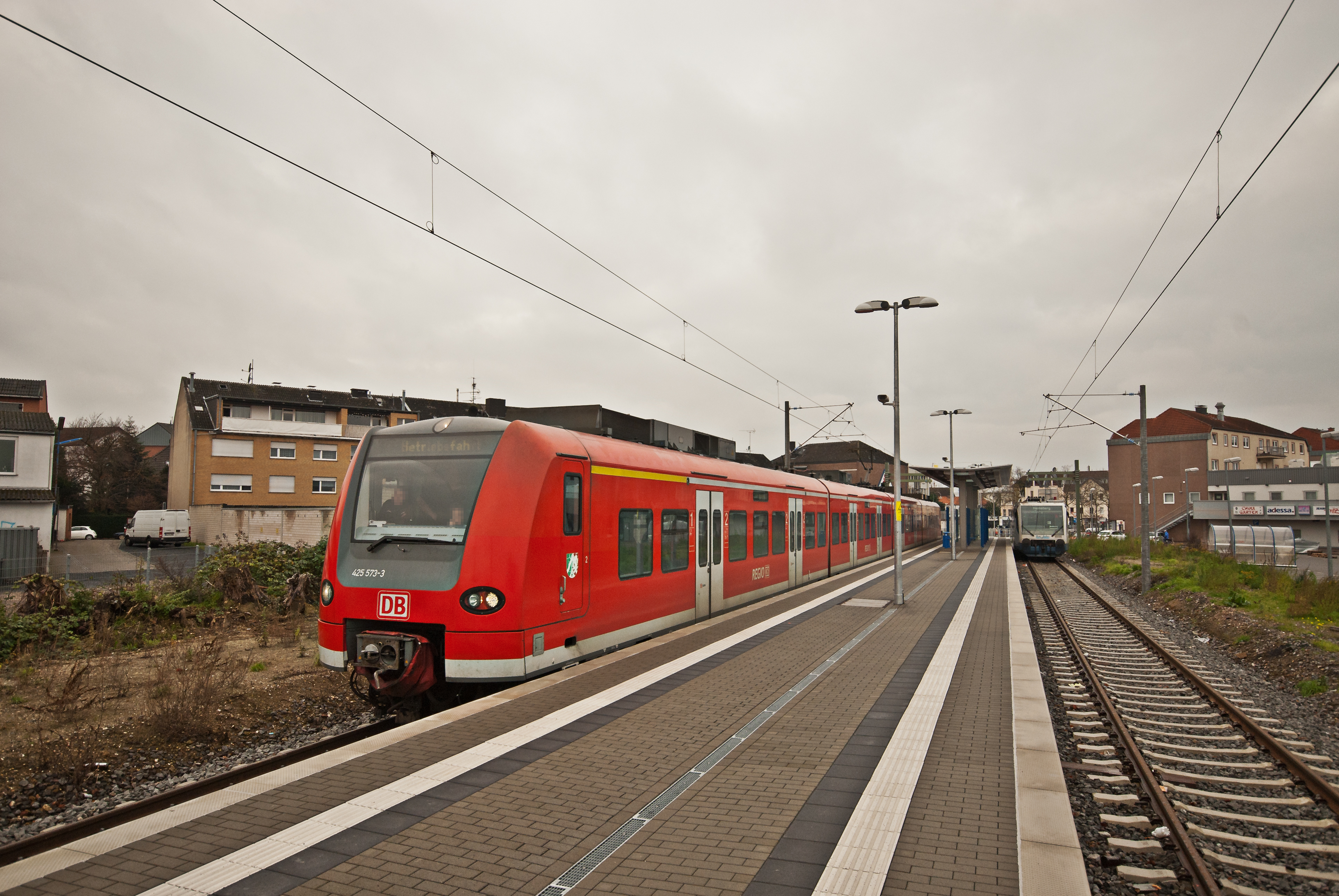 Regiosprinter und Baureihe 425 im Bahnhof Heinsberg. Es handelt sich um das erste reguläre elektrische Triebfahrzeug, dass unter Draht Heinsberg erreicht hat.